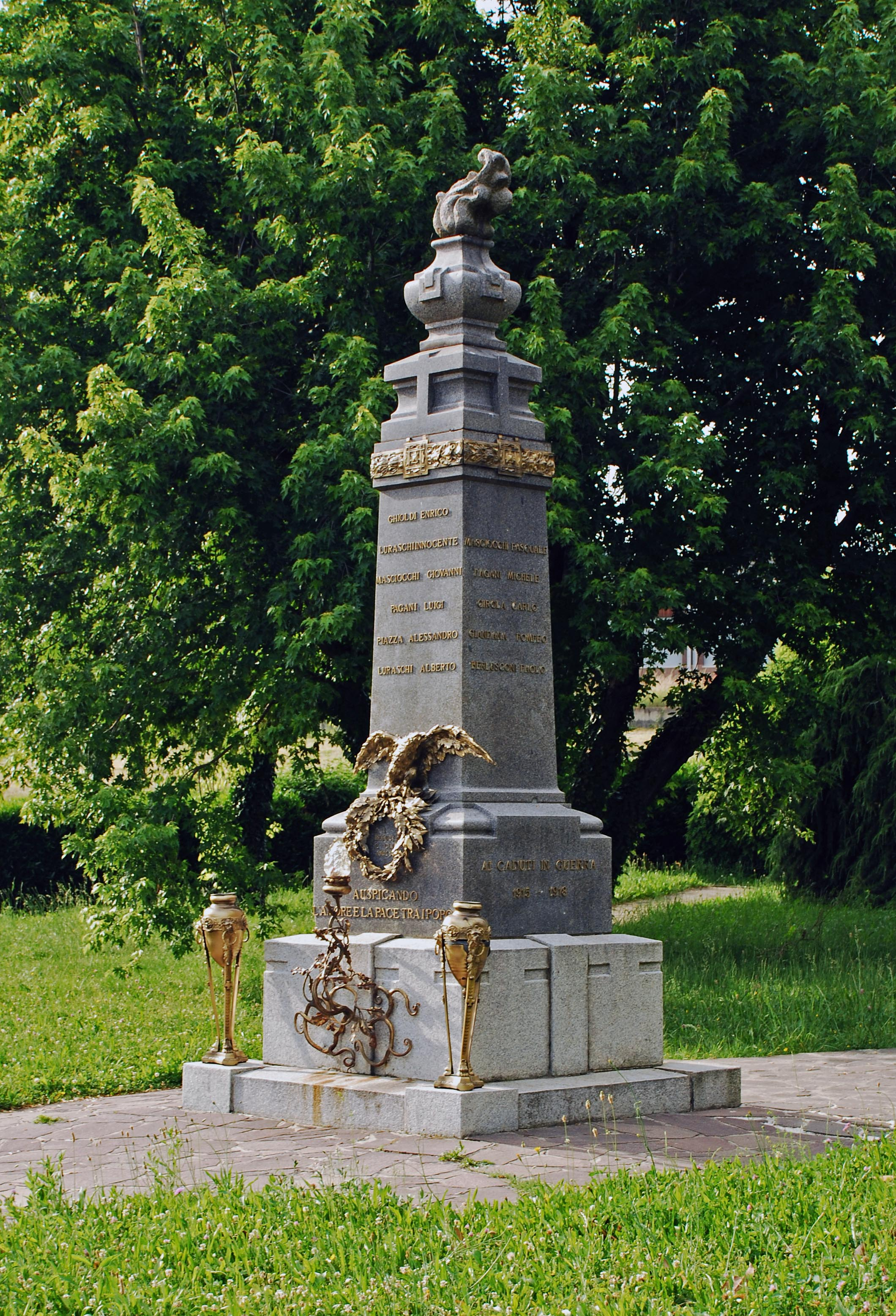 Monumento ai caduti di Lurago Marinone